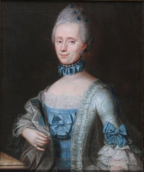 Porträt Sophia Eleanora von Lehwaldt, geborene von Kuhnheim, 2. Ehefrau des preußischen Generalleutnants Baron Wenzeslaus Hans Christoph von Lehwaldt (* 18. Februar 1717 auf Gut Ublick bei Johannisburg in Ostpreußen; † 27. Dezember 1793)